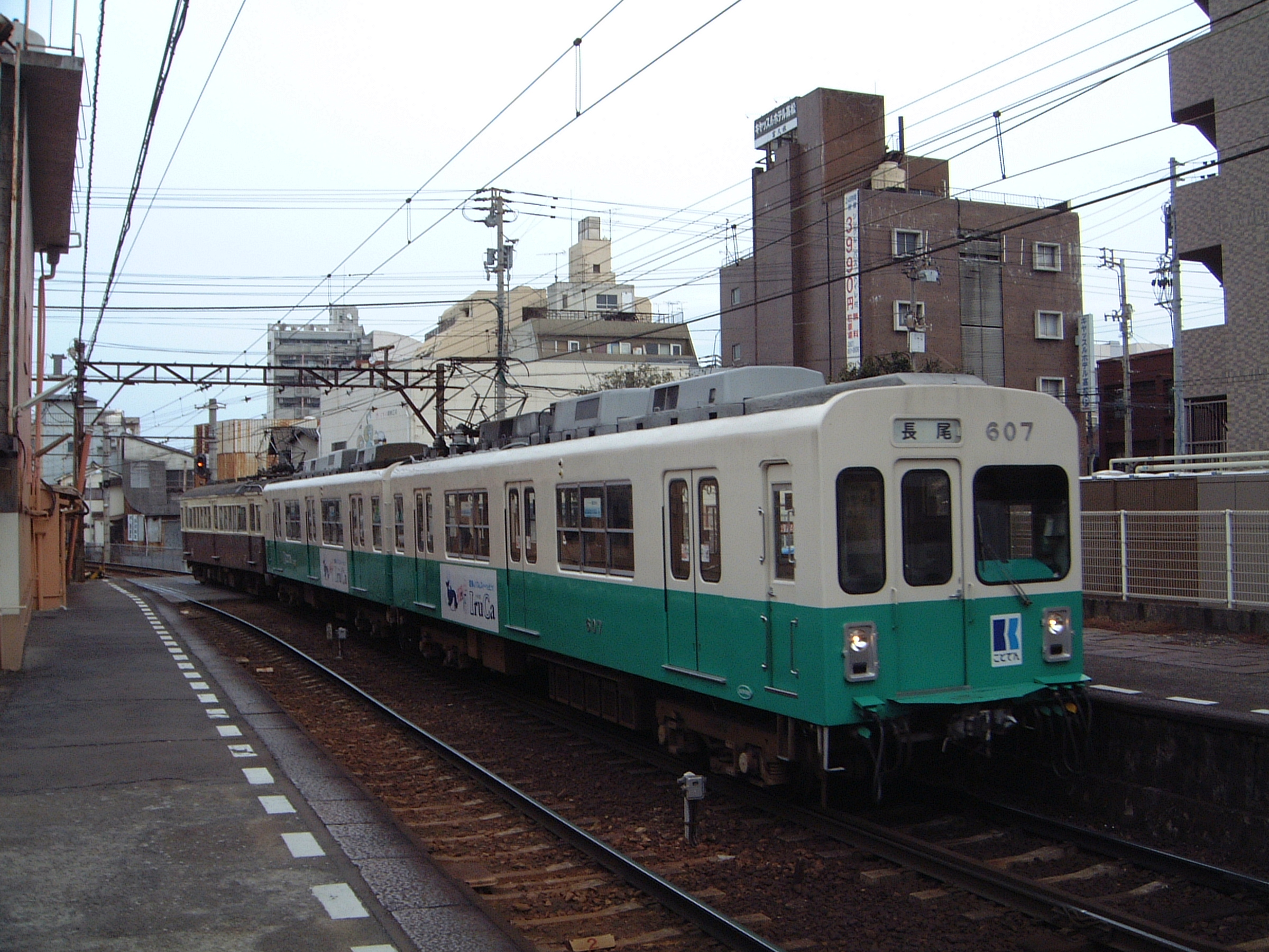 author:Fwng3431 Date:04/Jan/2006 Takamatsu-Kotohira Electric Railway Co.(Takamatsu,Japan) No.607 car Kataharamachi station 高松琴平電気鉄道 607号電車 片原町駅にて撮影